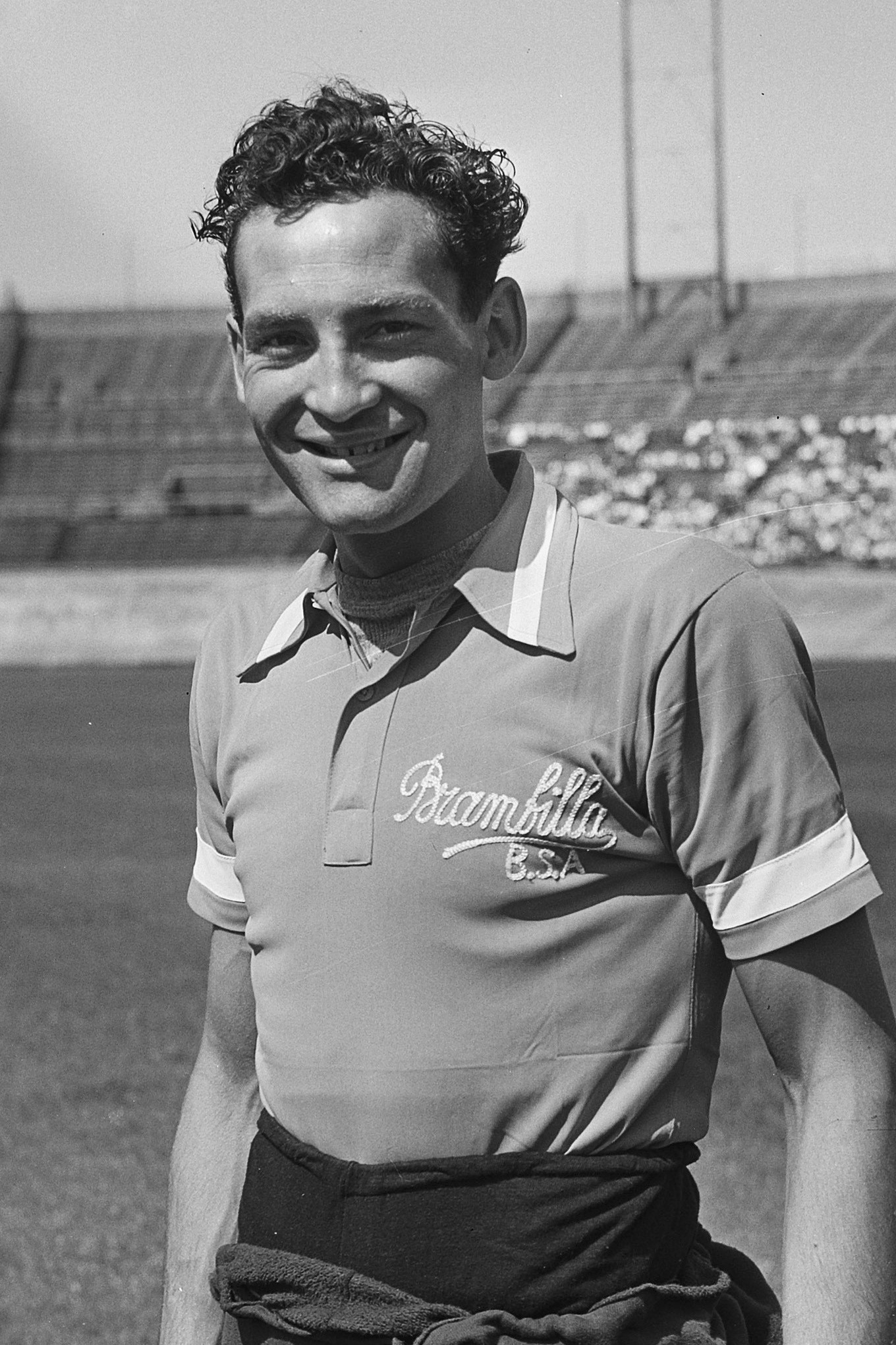 Baancompetitie in Olympisch Stadion te Amsterdam. Hein "Tarzan" van Breenen.